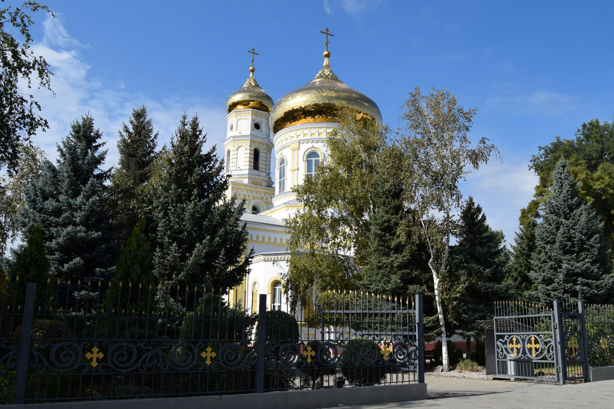 Спасо-Нерукотворного Образу собор, Павлоград, пров. Голубицького (Молодіжний)